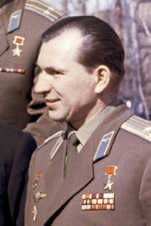 P. I. Belajev